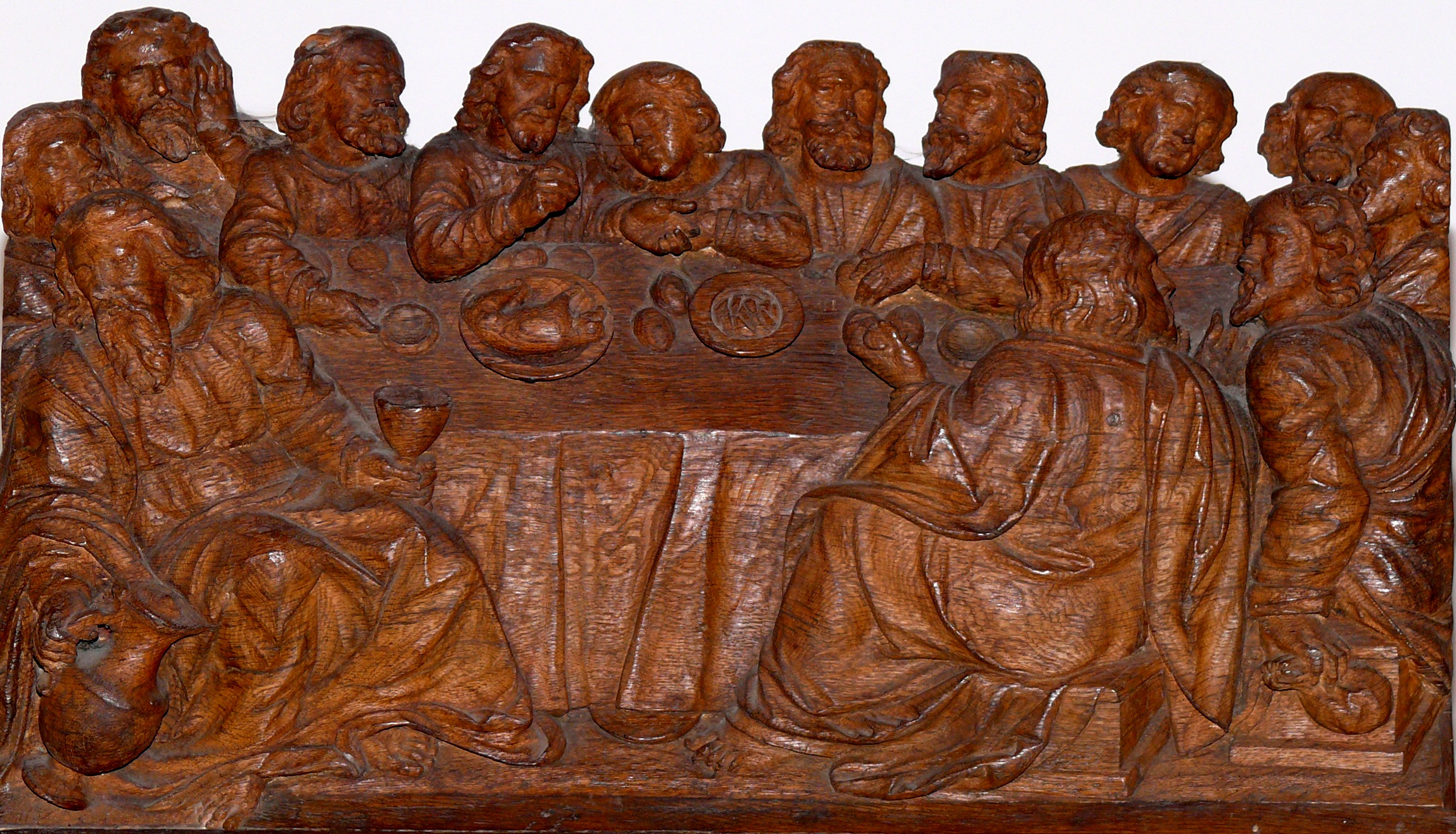 Geschnitzte Darstellung des letzten Mahles Jesu mit seinen Jüngern auf dem Altar der St. Andreas-Kirche in Lübbecke. Auf dem Tisch stehen Spanferkel und Grünkernsuppe als typisch westfälische Gerichte auf dem Tisch. (vgl. das Heft "Führung durch die St.-Andreaskirche")